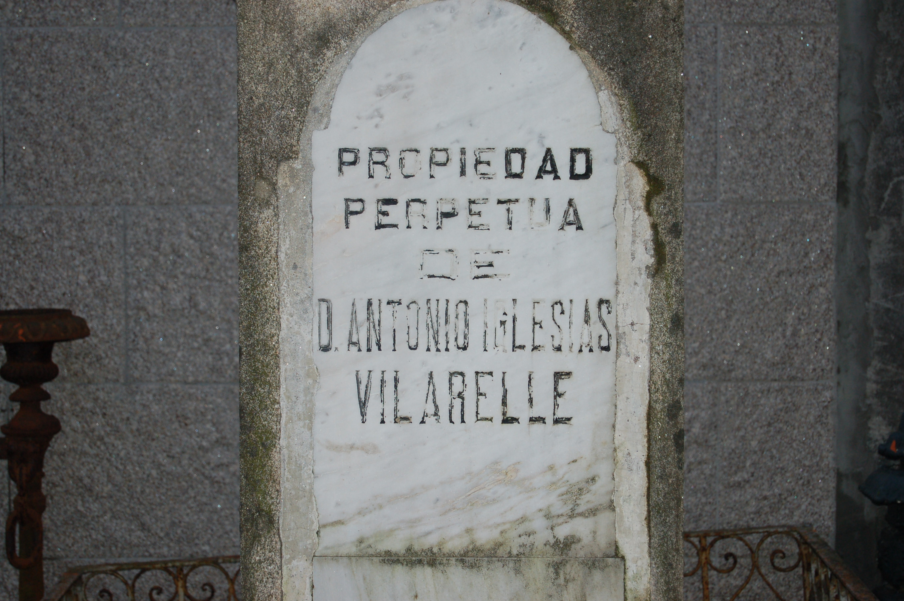 Sepulcro de Antonio Iglesias Vilarelle no Cemiterio de San Amaro de Pontevedra